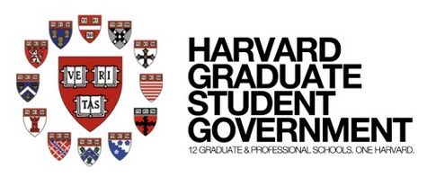 Harvard Graduate Student Government